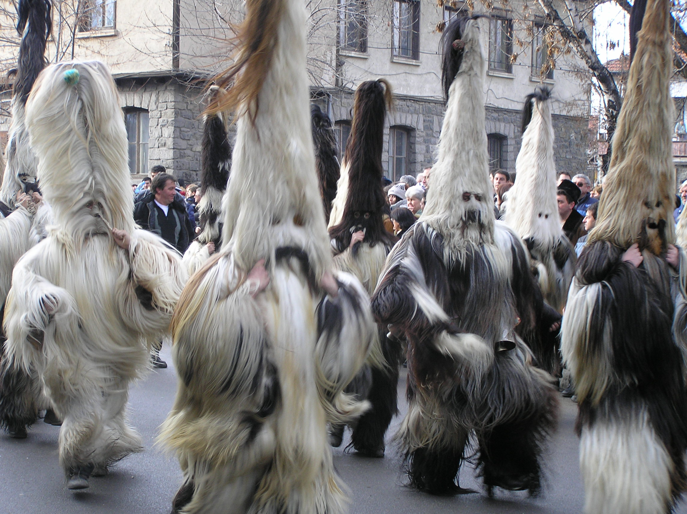 Кукери или "чауши" в гр. Разлог на 1 януари (Нова Година).